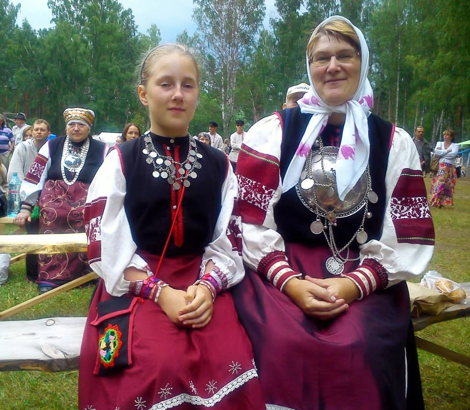 Tradycyjne stroje kobiece z regionu Setomaa, Estonia